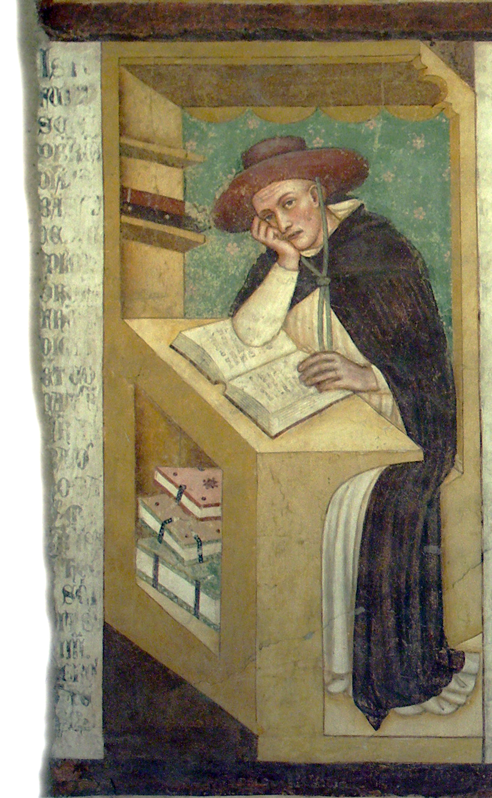 Annibaldo Annibaldi, serie dei Quaranta domenicani illustri, ex convento di San Niccolò, Sala del Capitolo, Treviso, 1352 (altezza di ciascun ritratto 150 cm circa)